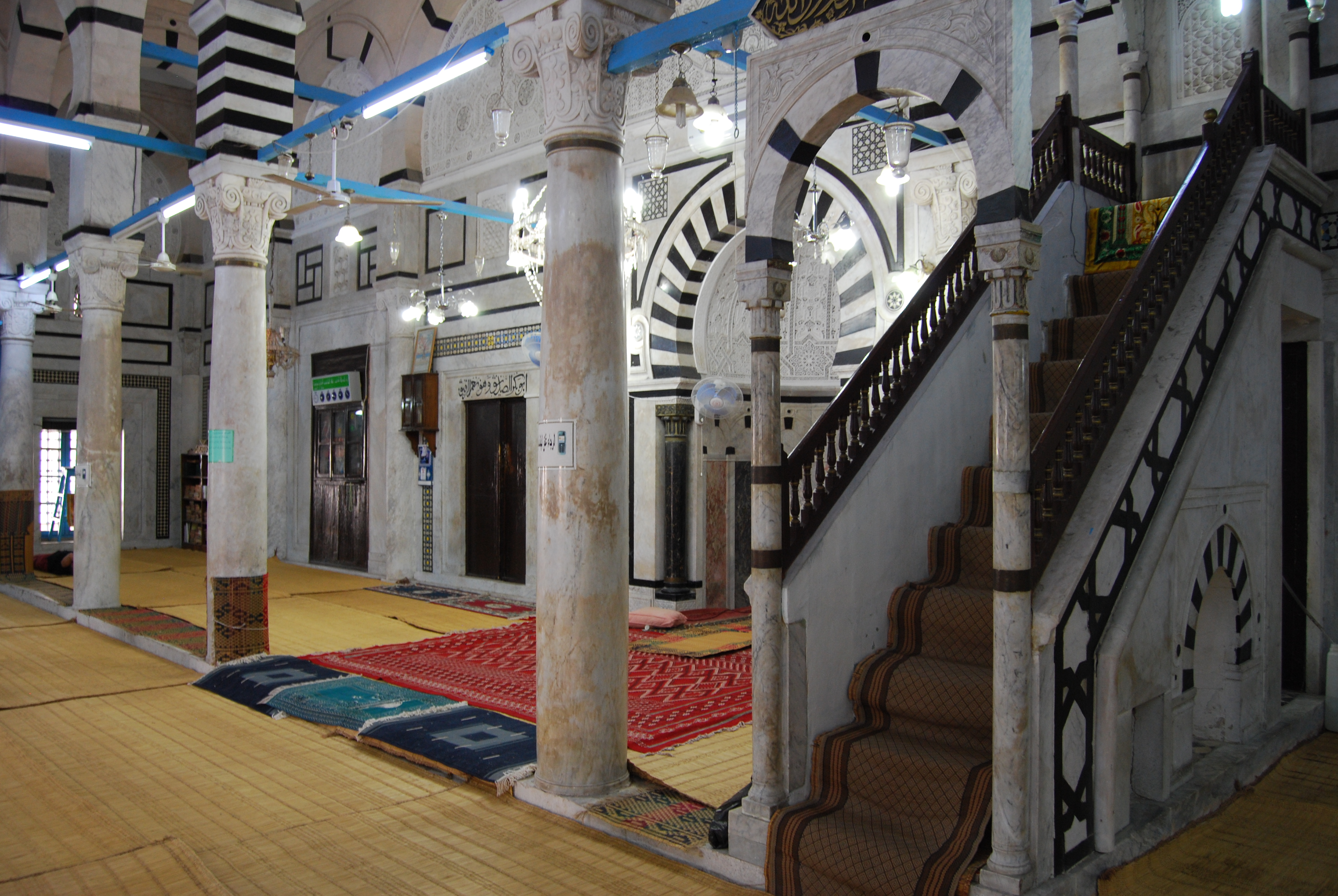 Mosquée Sidi Hamouda Bacha, Tunis